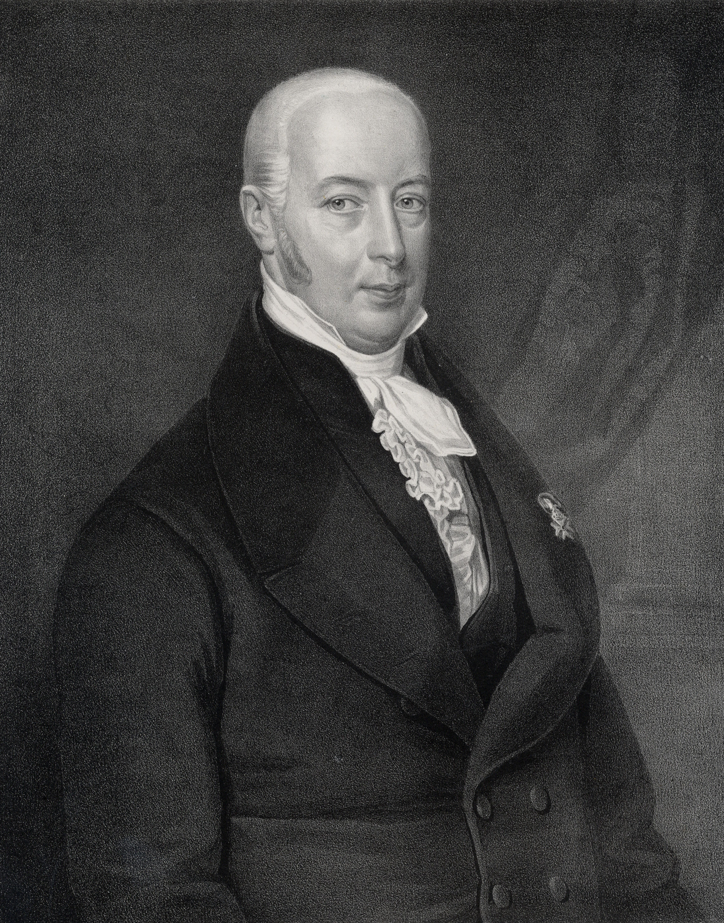 Portret van Walraven Robbert baron van Heeckeren van Brandsenburg, geboren 19 november 1776, burgemeester van Utrecht (1815 en 1816); wethouder (1824-1828); een van de vier burgemeesters (1817-1824), overleden 23 juli 1845. Te halve lijve rechts.